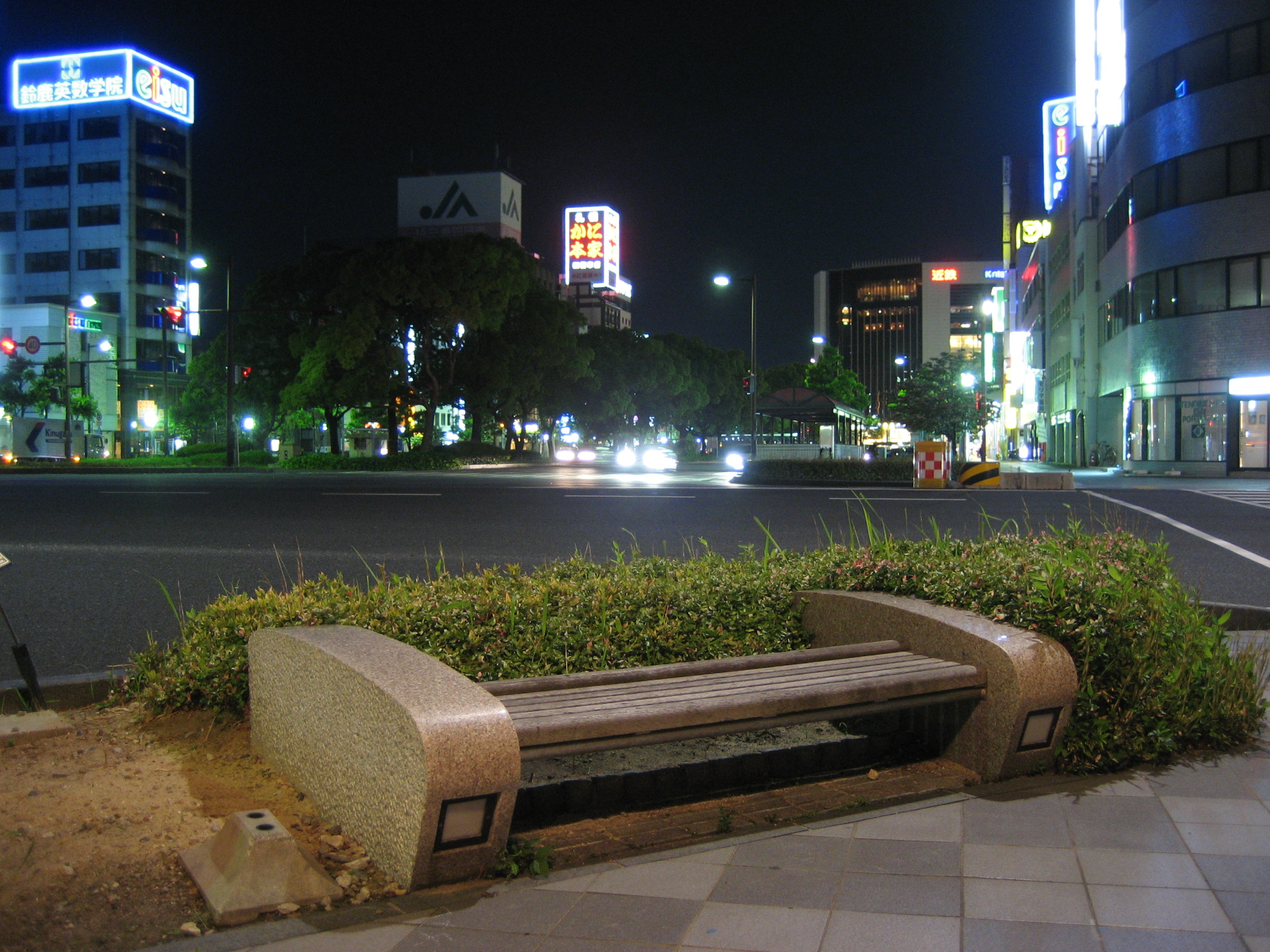 Yokkaichi Chuo-dori St.